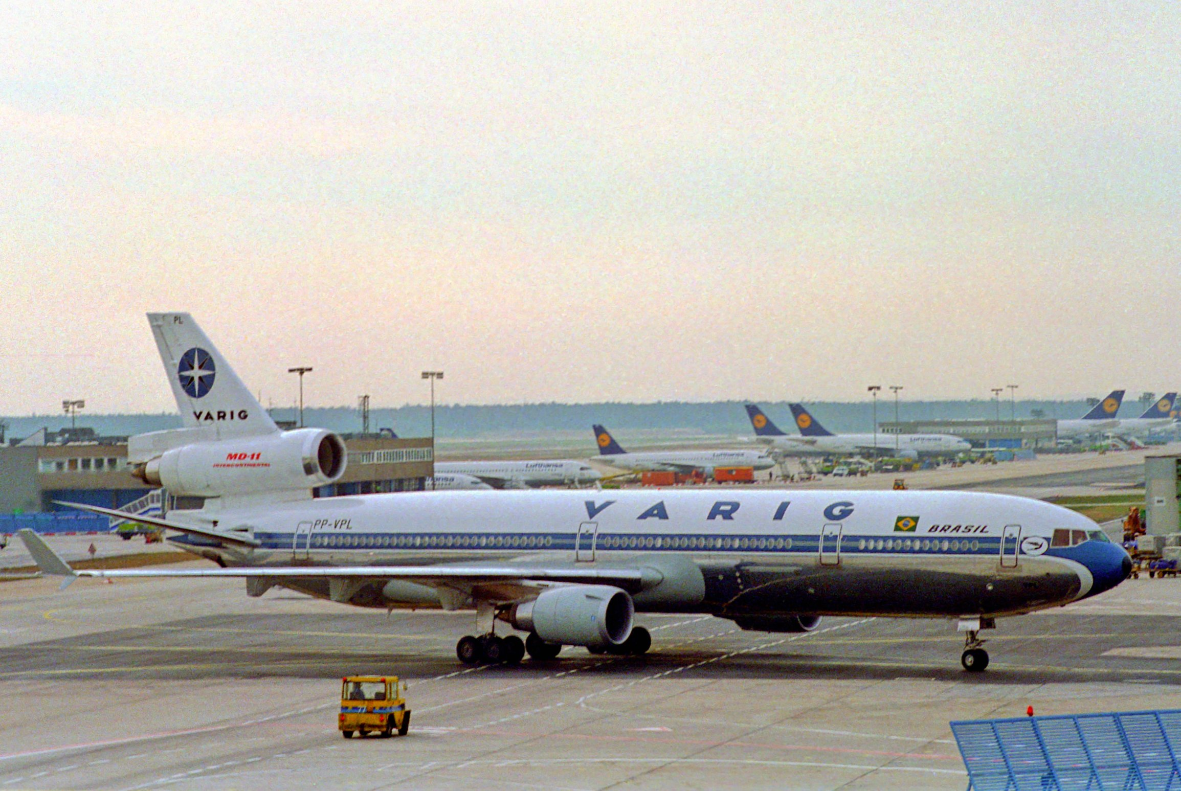 VARIG MD-11; PP-VPL@FRA;19.10.1994